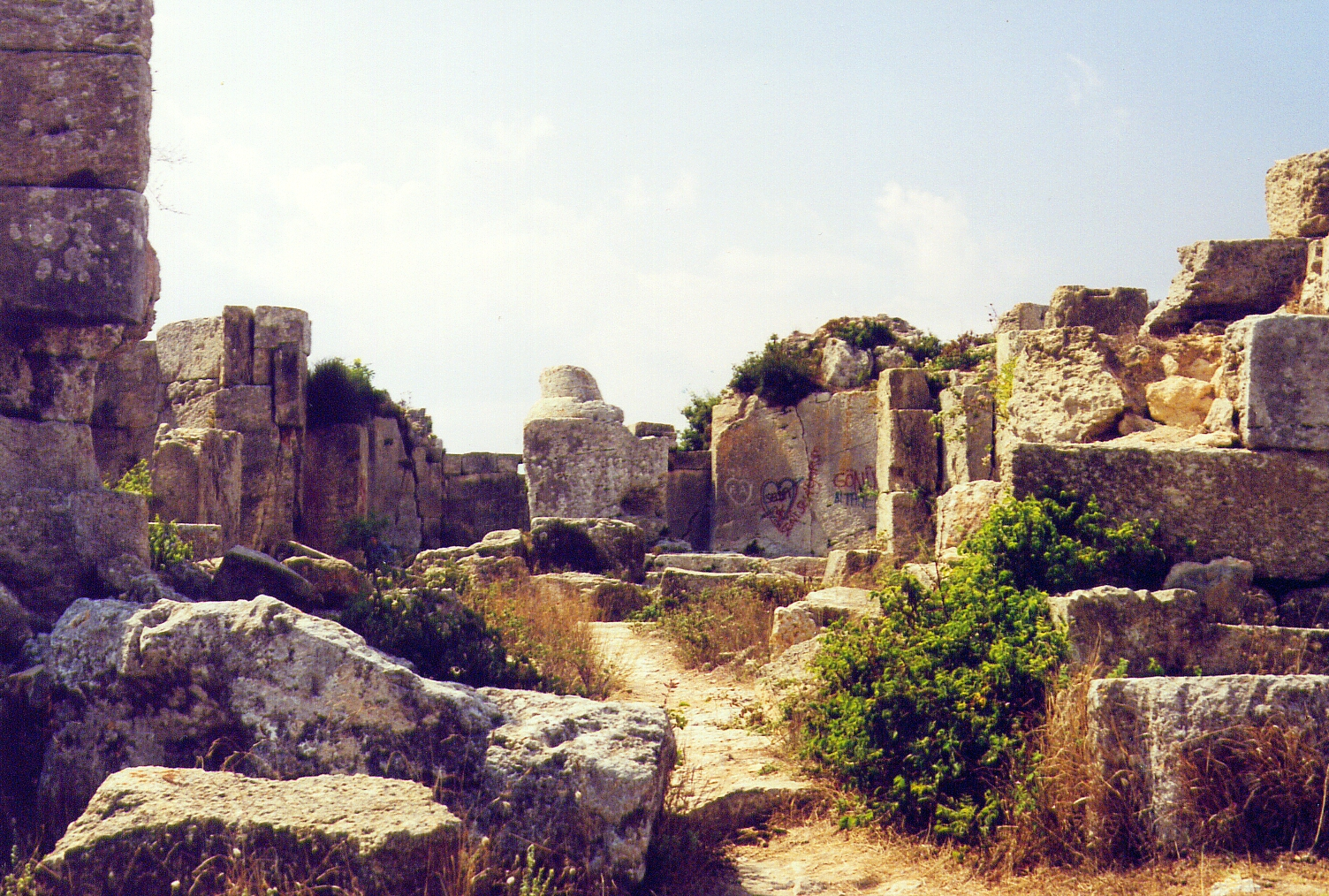 Kloster des Säulenheiligen Simeon Stylites des Jüngeren, Nähe Antakya, Südtürkei In der Mitte der Rest der Säule, auf der er angeblich gelebt hat